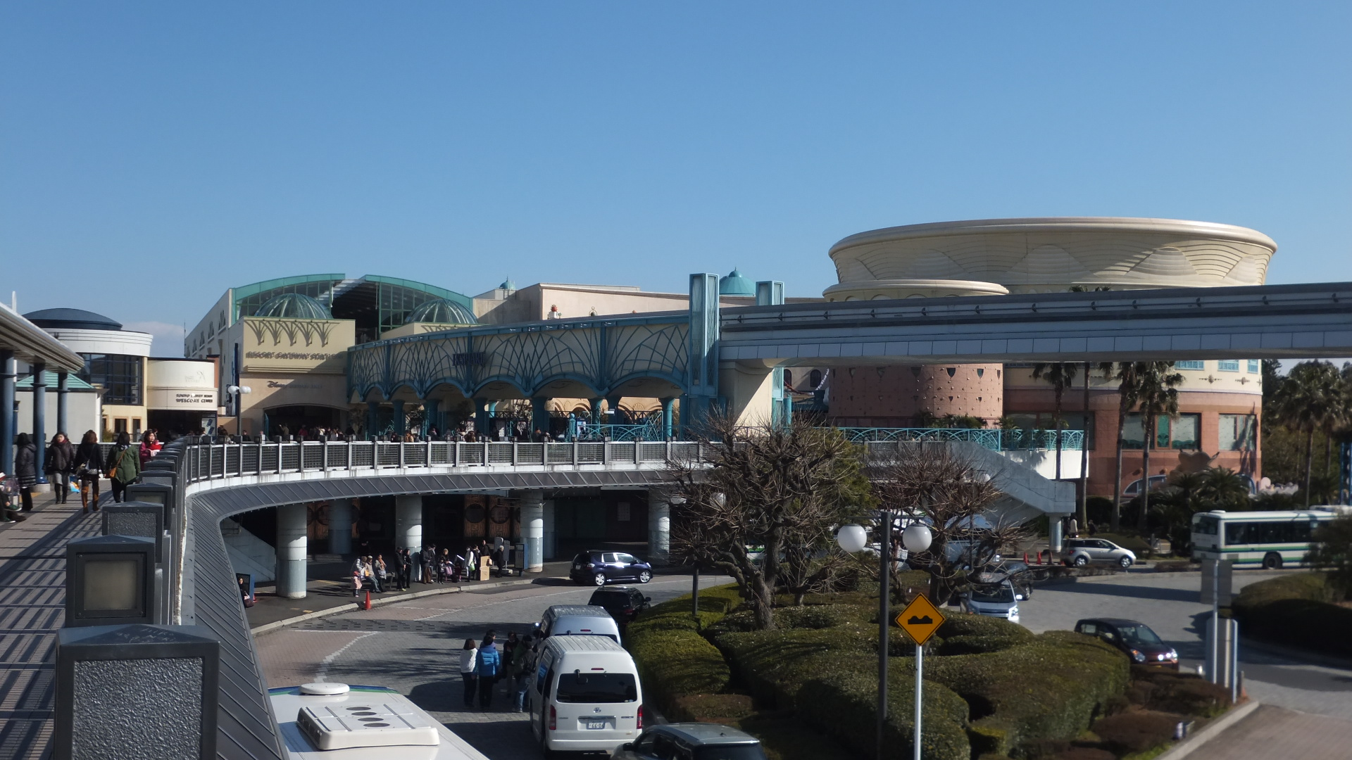 イクスピアリとリゾートゲートウェイ・ステーション